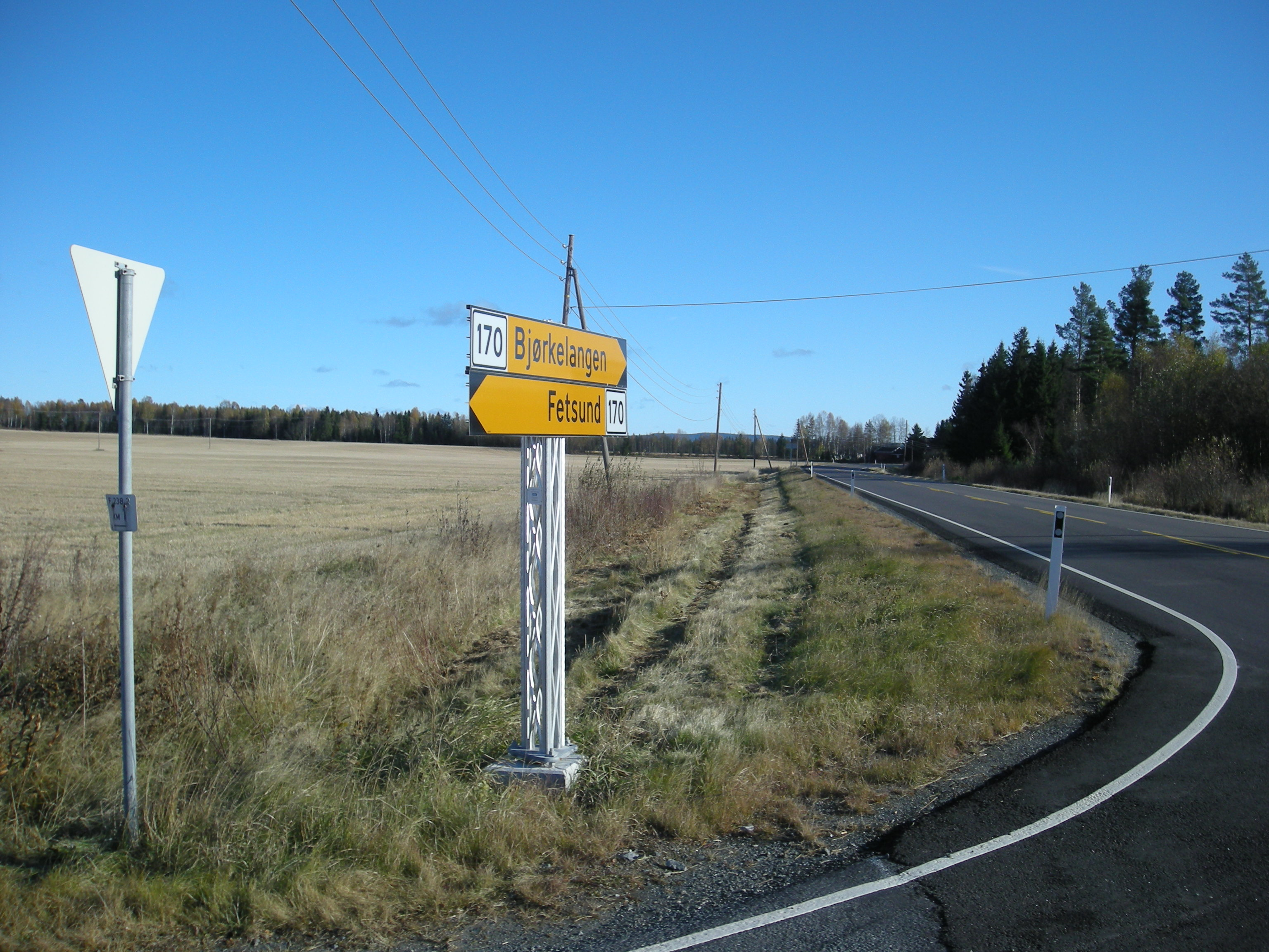 Fylkesvei 170 ved Killingmo